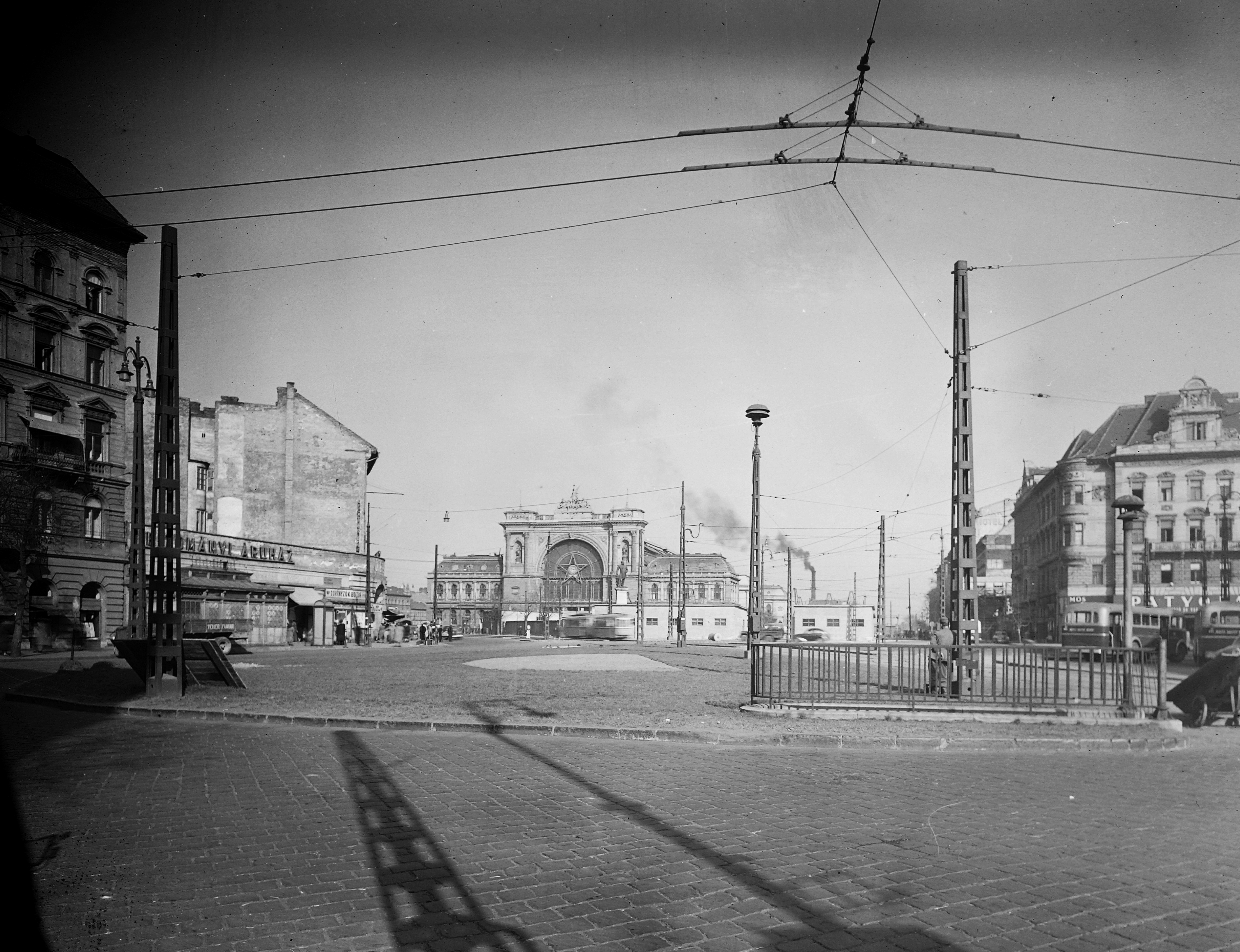 Baross tér, Keleti pályaudvar. Location: Hungary, Budapest VII. Tags: railway, sign-board, tram, firewall, train station, street view, genre painting, Red Star, siren, phone booth, public toilet, sculpture, chimney, smoke, Budapest Title: Baross tér, Keleti pályaudvar.